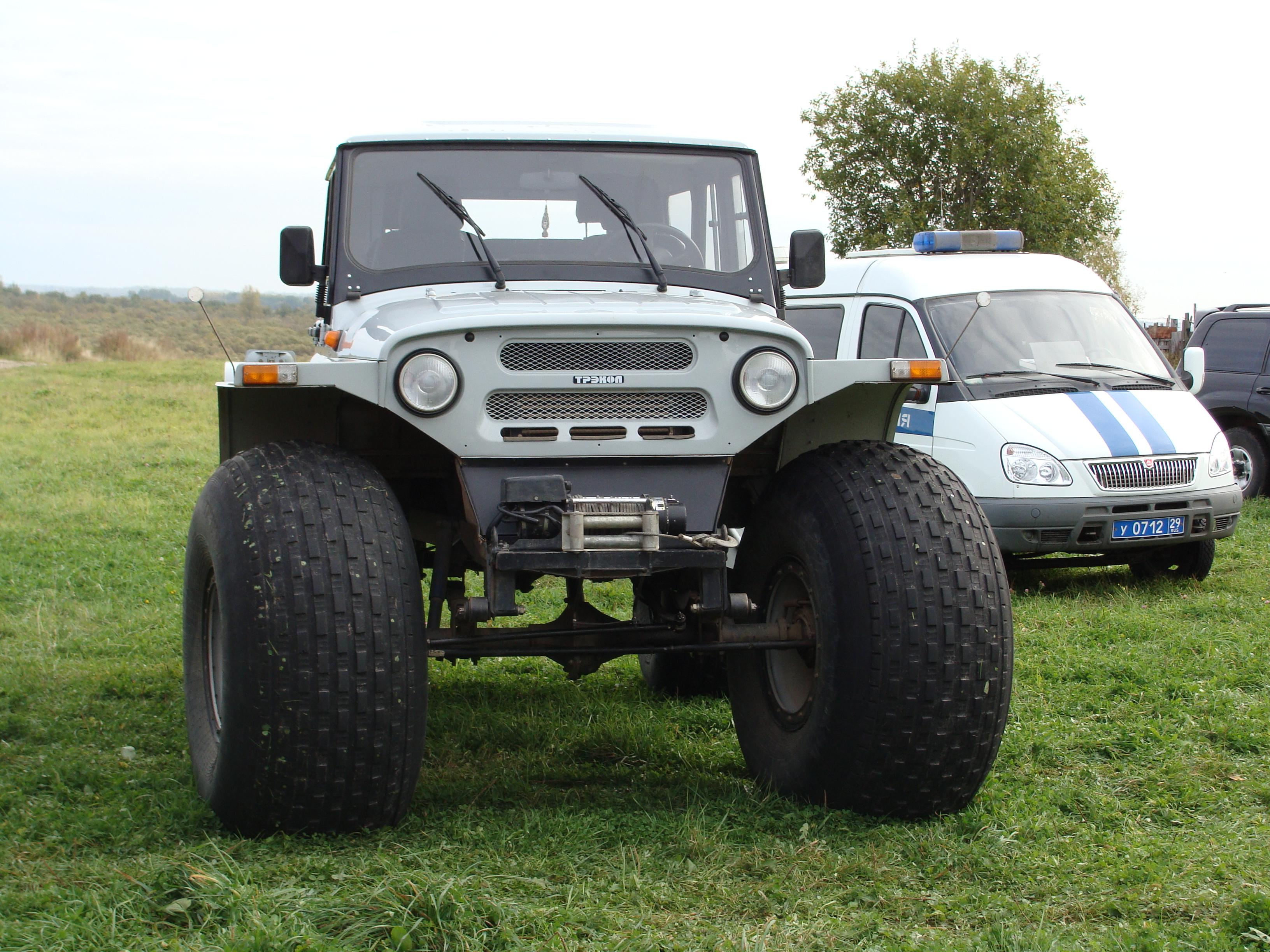 День работников леса. Коряжма 2009